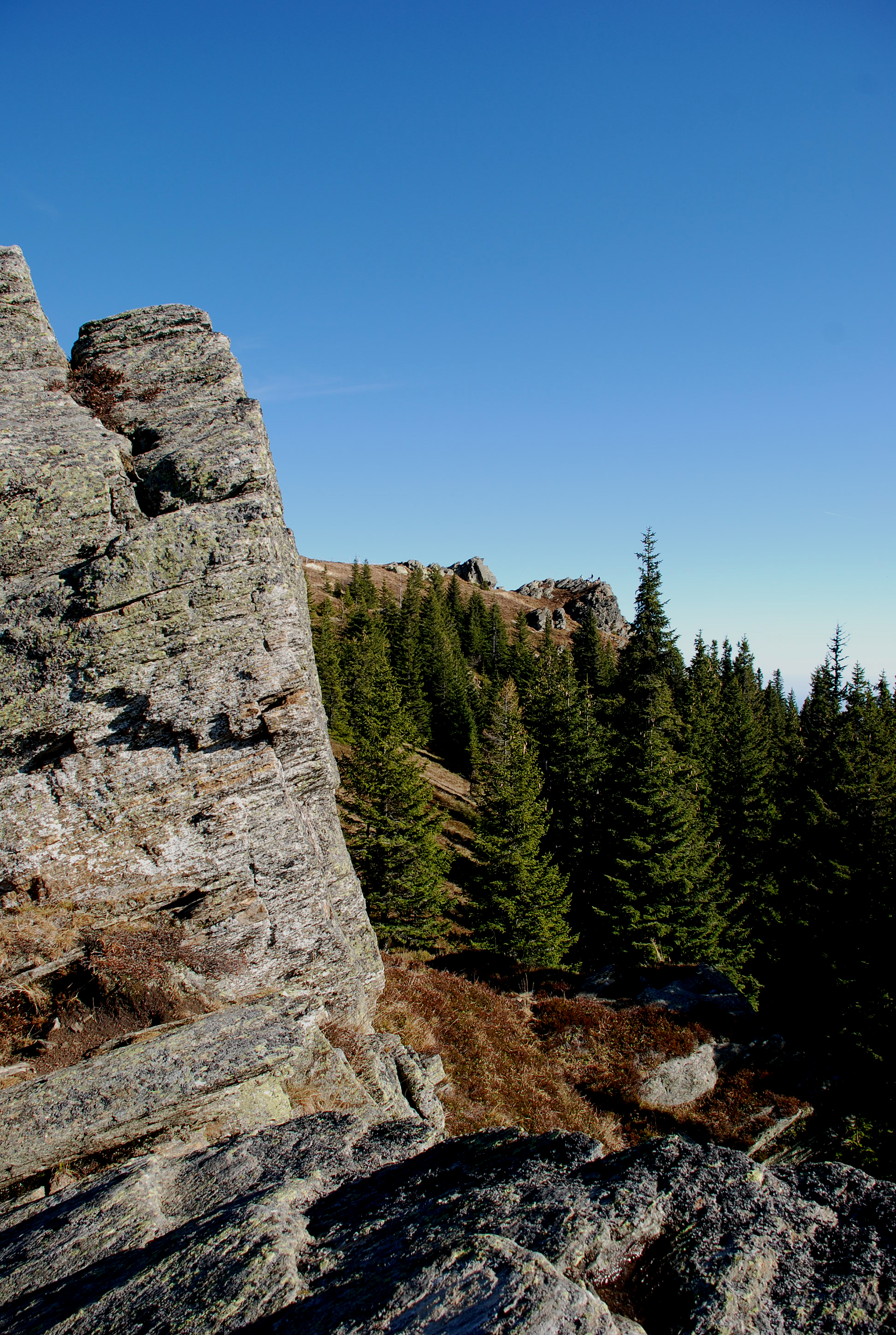 Gesteinsverwitterung auf der Handalm in der mitteren Koralpe, Steiermark/Kärnten, Österreich: Als "Ofen" (Mehrzahl "Öfen") werden Felsblöcke aus Gneisplatten bezeichnet, die durch Verwitterung markante Formen bilden.